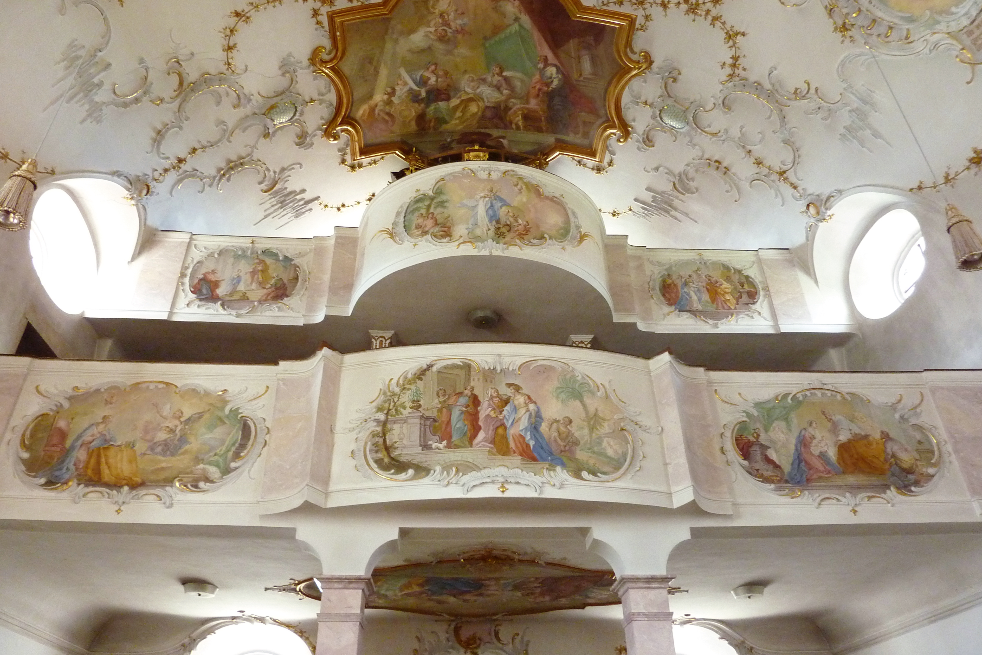 Katholische Wallfahrtskirche Mariä Himmelfahrt in Buggenhofen, einem Ortsteil von Bissingen im Landkreis Dillingen an der Donau (Bayern), Empore, Fresken mit Szenen aus dem Marienleben